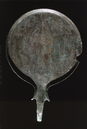 Escena donde Menrva sostiene a Maris, flanqueada por Turms y Amamtunia, sosteniendo a otros dos Maris bebé.